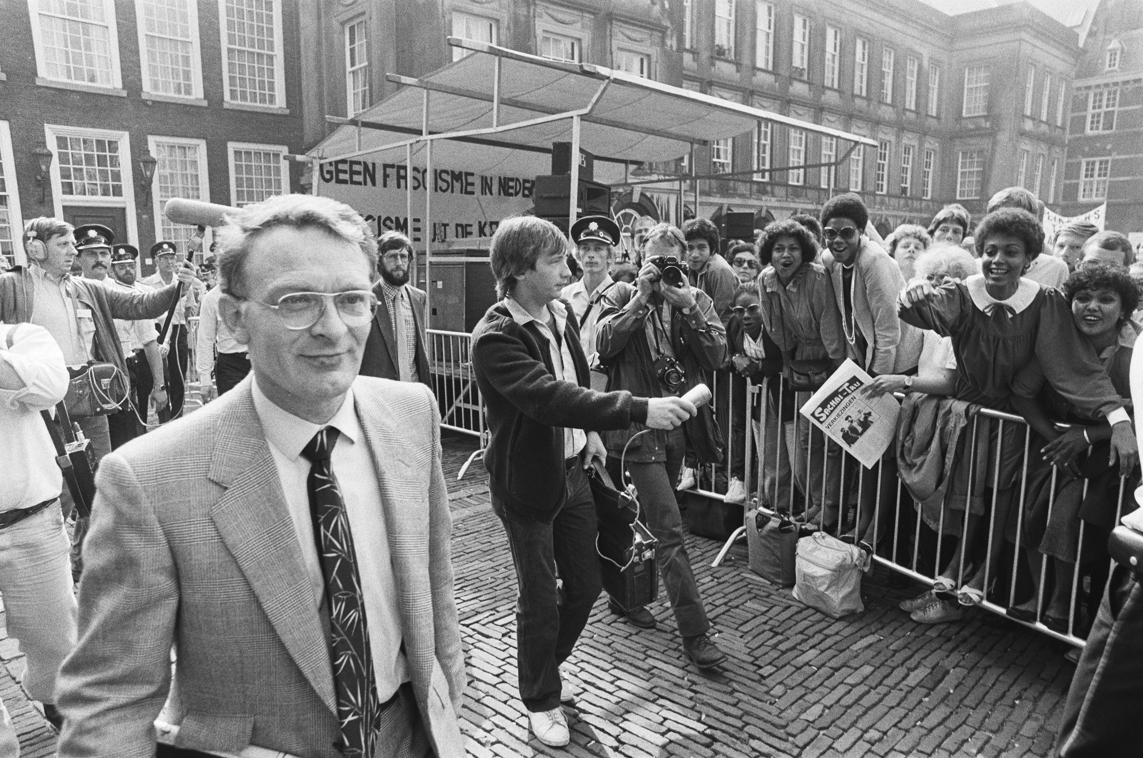 Collectie / Archief : Fotocollectie Anefo Reportage / Serie : Demonstratie op het Binnenhof tegen de Centrumpartij in de Tweede Kamer Beschrijving : Janmaat (Centrumpartij) loopt langs de demonstranten Datum : 16 september 1982 Locatie : Den Haag, Zuid-Holland Trefwoorden : demonstranten, demonstraties Persoonsnaam : Janmaat, Hans Fotograaf : Bogaerts, Rob / Anefo Auteursrechthebbende : Nationaal Archief Materiaalsoort : Negatief (zwart/wit) Nummer archiefinventaris : bekijk toegang 2.24.01.05 Bestanddeelnummer : 932-3282